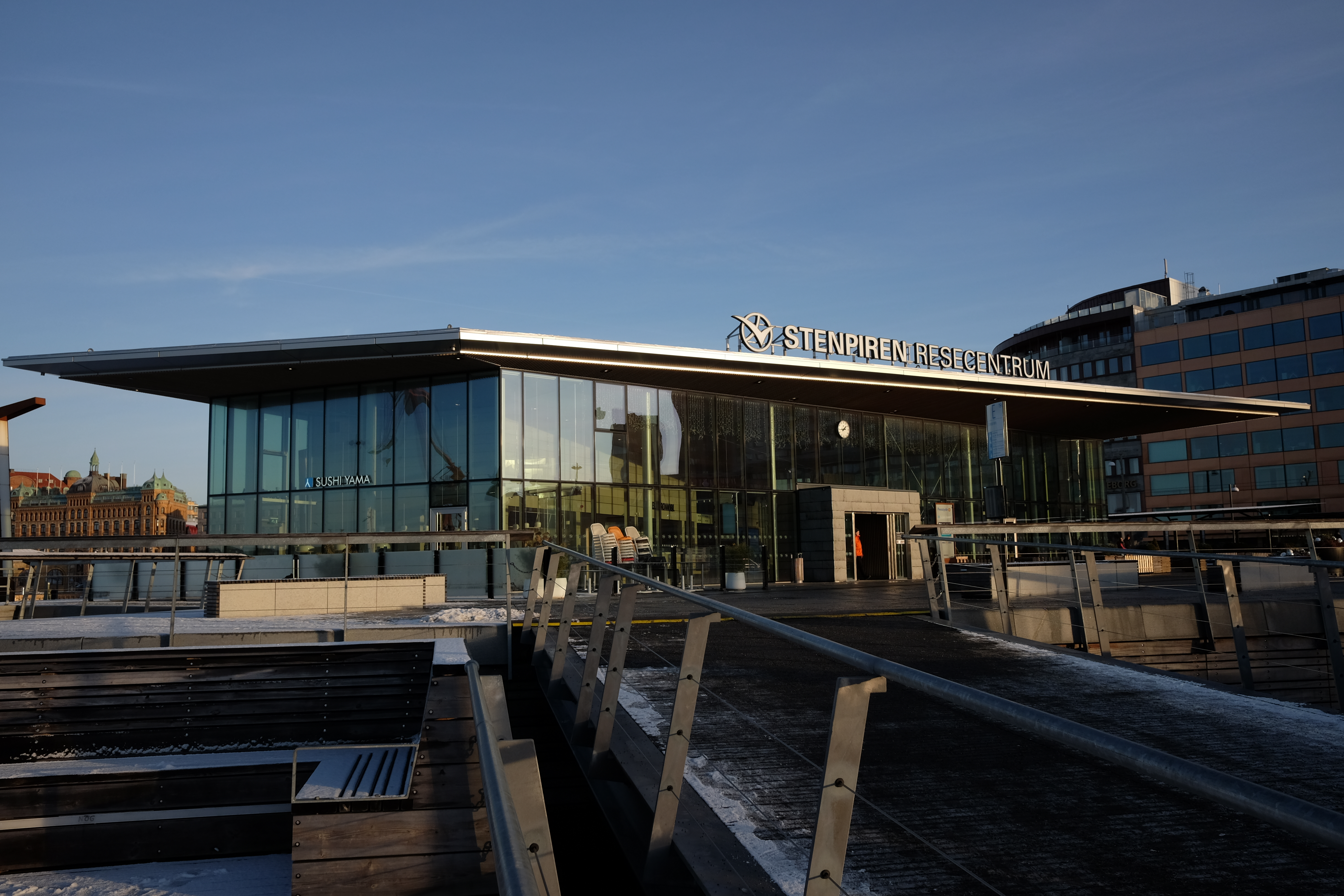 Resecentrum Stenpiren, Göteborg.